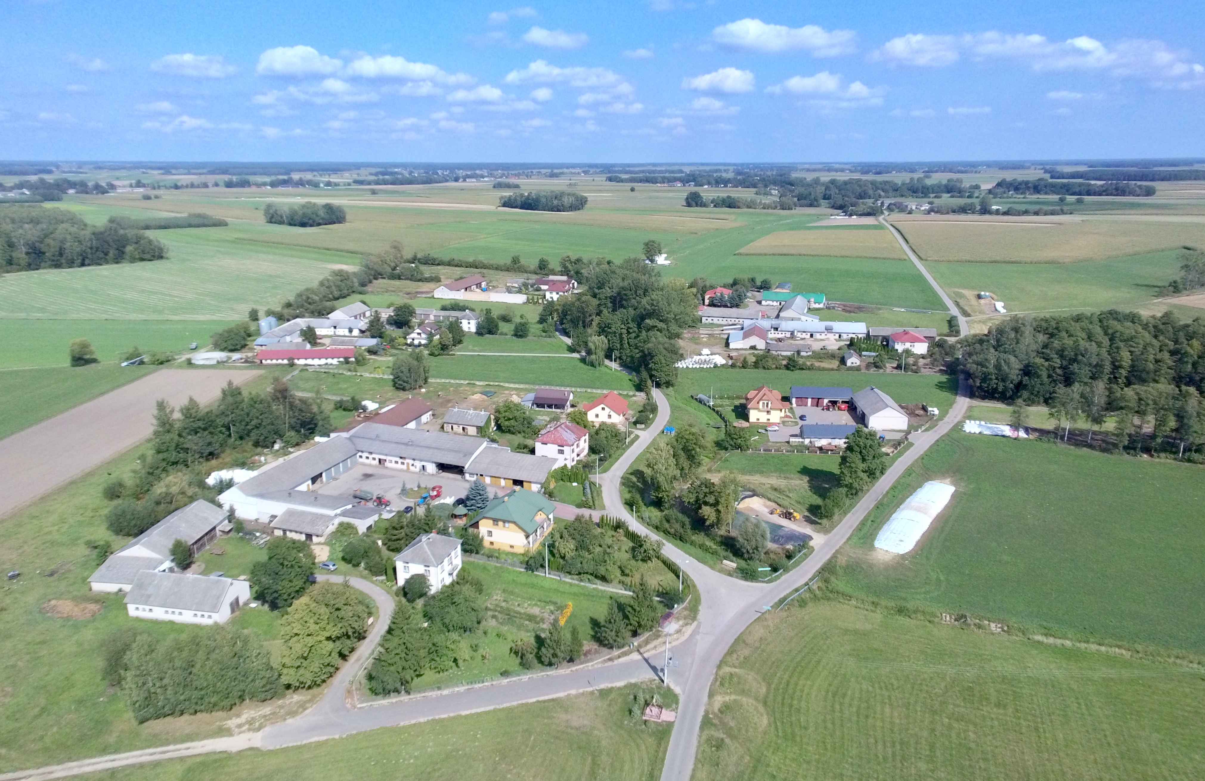 skarzyn,nowy,miejscowość,zdjęcie